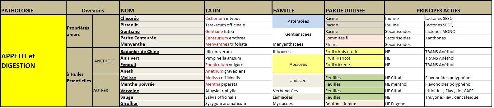 Principales plantes utilisées en phytothérapie pour leurs propriétés digestives